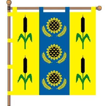 прапор с. Миколо-Комишувата